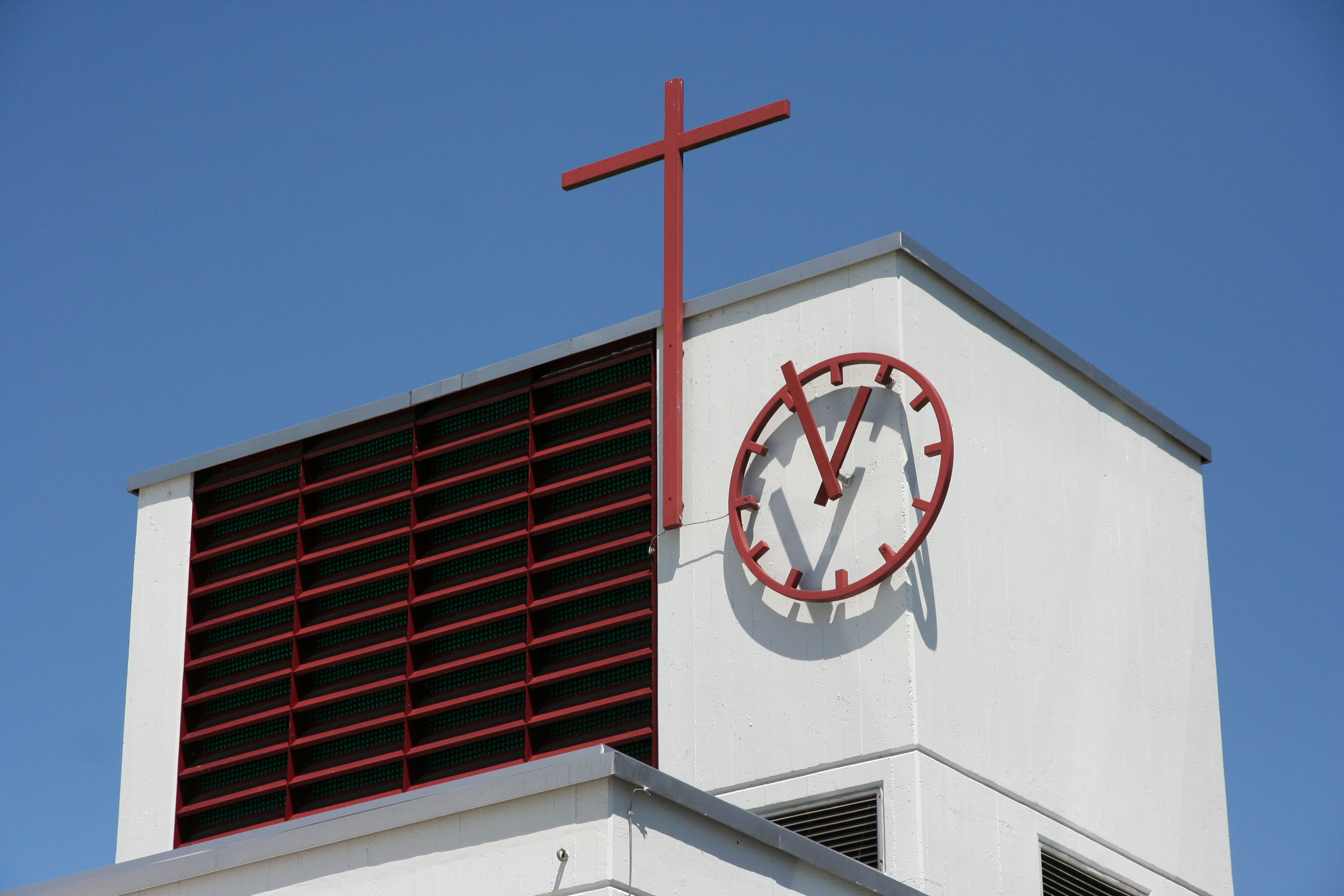 Römisch-katholische Pfarrkirche St. Johannes der Täufer Geroldswil, Glockenturm